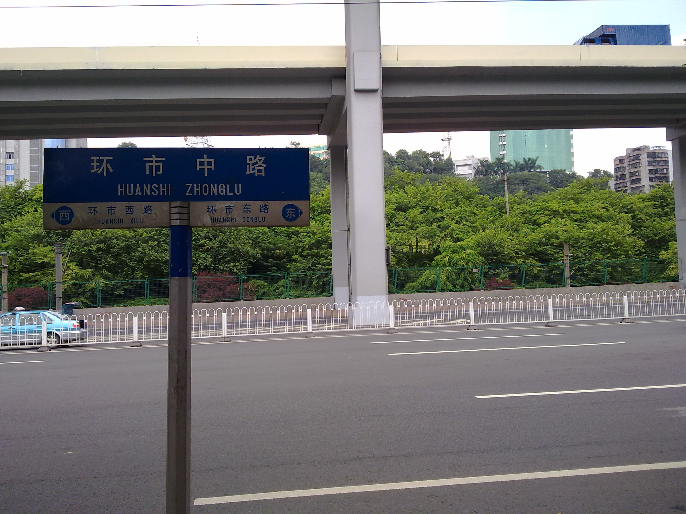 中文（香港）: 廣州市環市中路